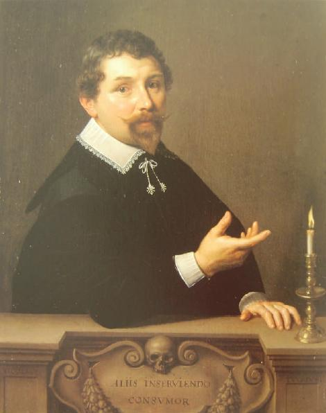 Das Portrait malte Pickenoy zum Dank für die erfolgte Behandlung seiner Tochter durch Dr. Tulp.